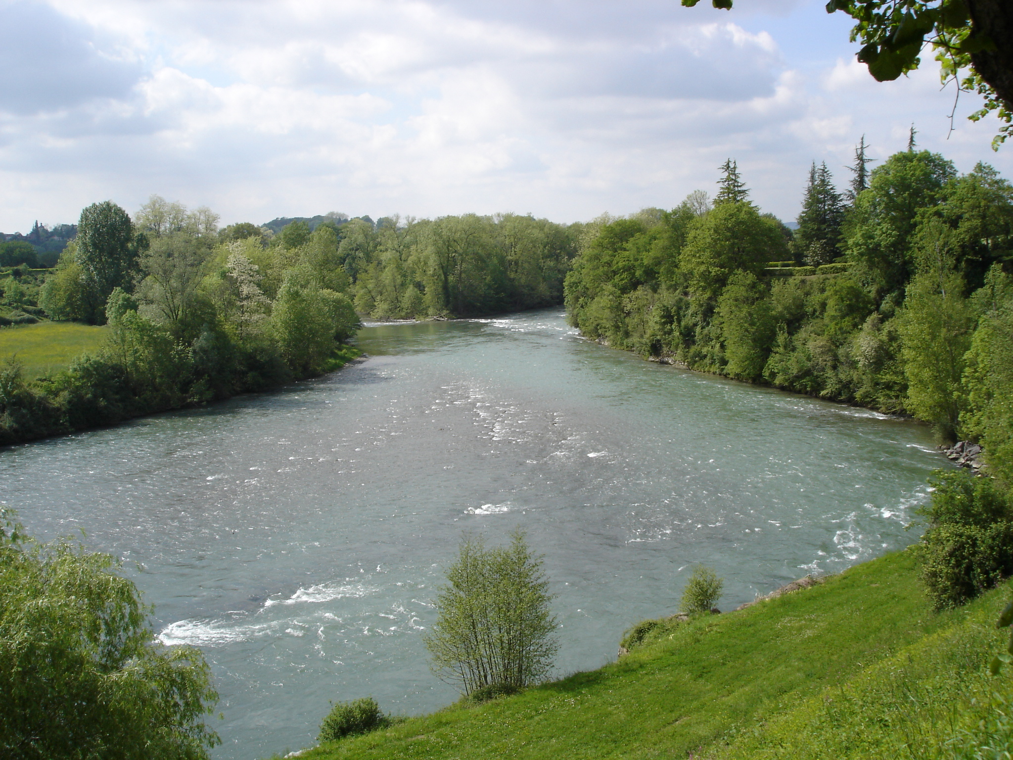 Le gave d'Oloron à Navarrenx -- Photo amateur prise par moi-même.